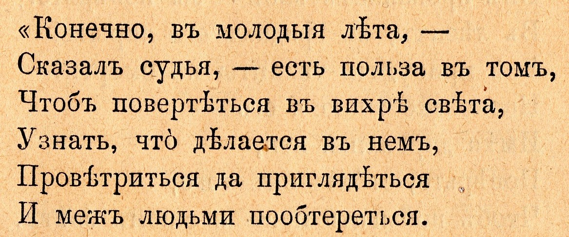 Extrait d'une version russe de Pan Tadeusz, d'Adam Mickiewicz, en orthographe russe antérieure à la réforme orthographique de 1917 (Saint-Petersbourg, 1902).